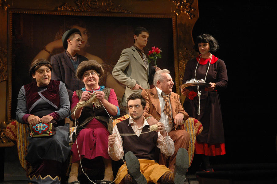 Српски (ћирилица): Сцене са премијере позоришне представе "Госпођа Министарка" у извођењу ансамбла позоришта Бошко Буха.